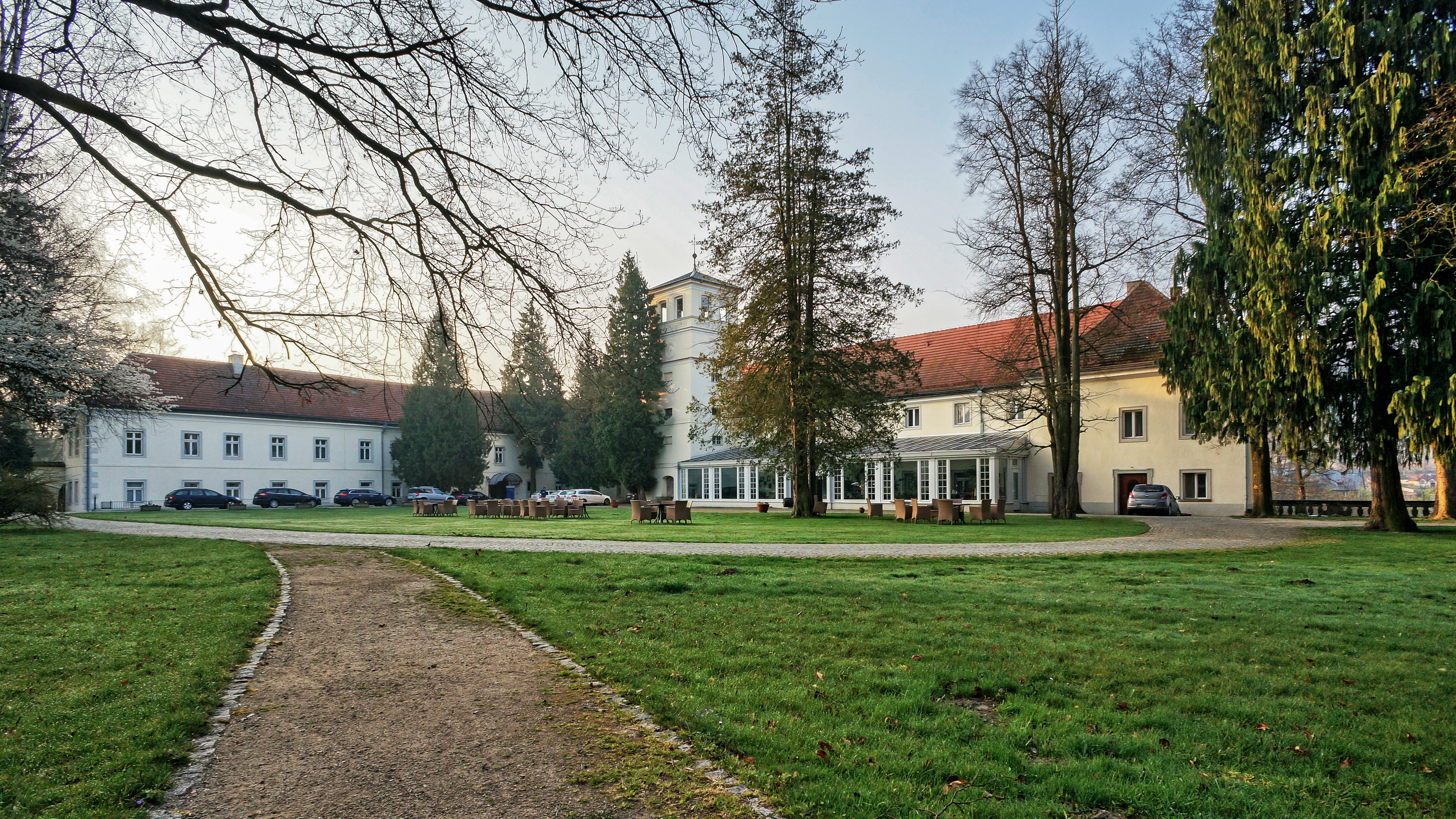 Pałac "Zamek na Skale" w Trzebieszowicach 07.1977.